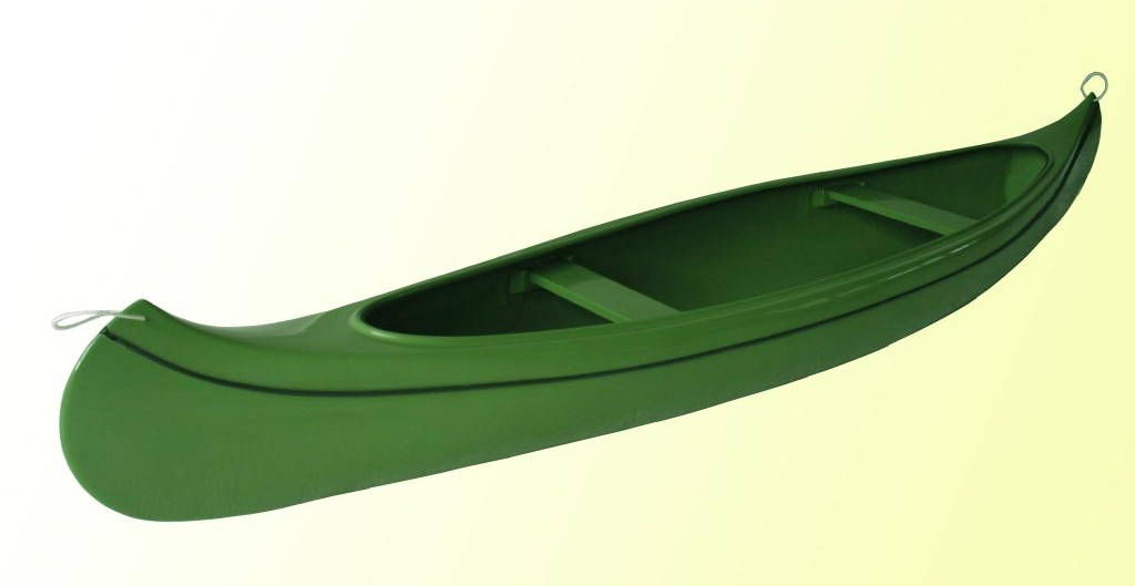 002-17_Premix-KanuMorava